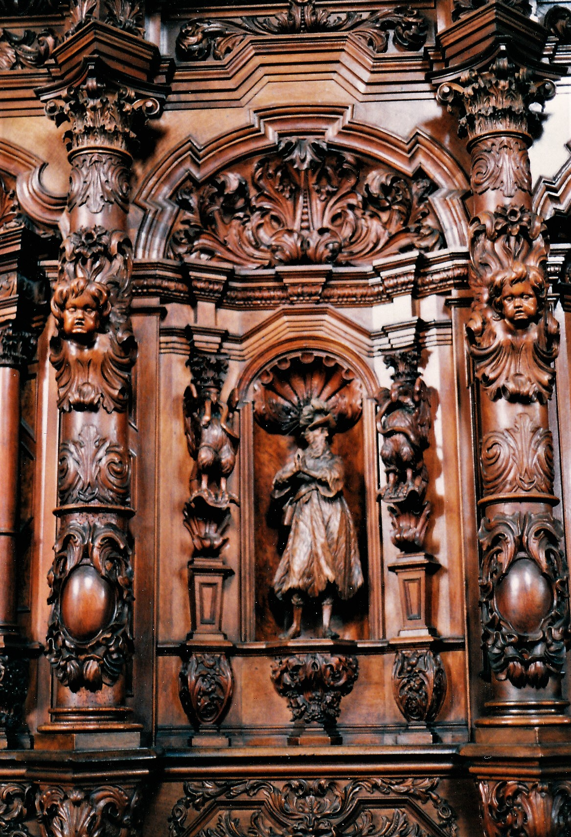 St. Verena (Rot an der Rot), Chorgestühl von 1693: Wilhelm von Malavalle